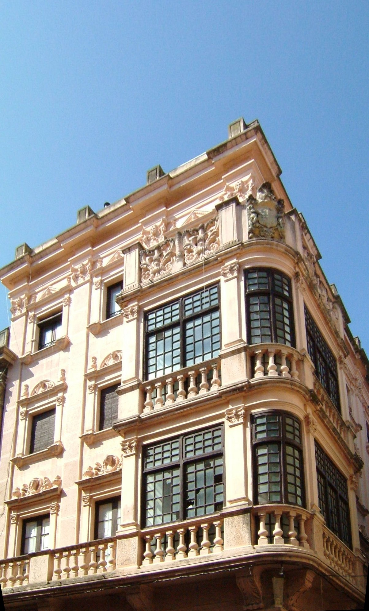 Teatro Apolo de Miranda de Ebro - España